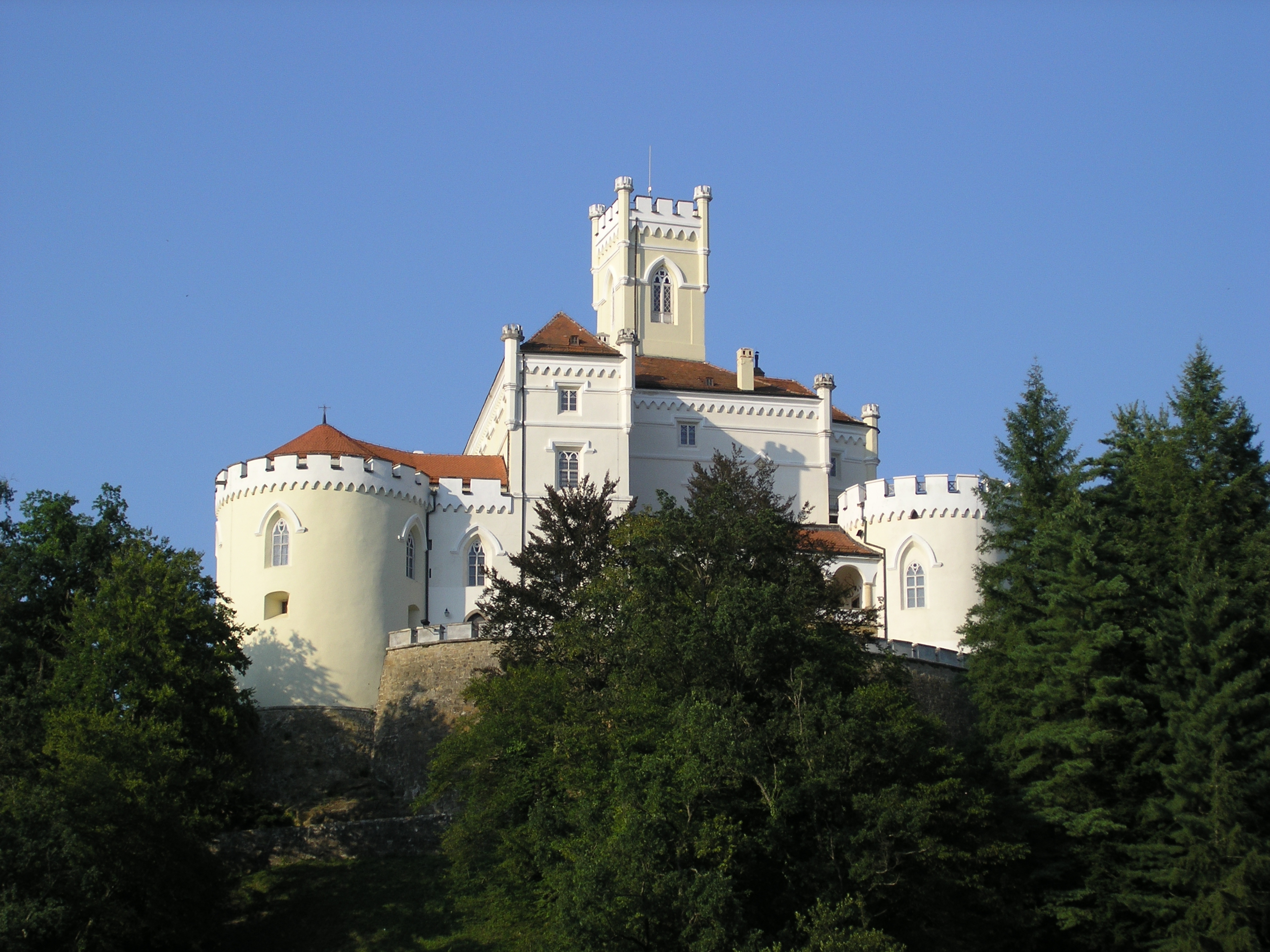 Trakošćan castle